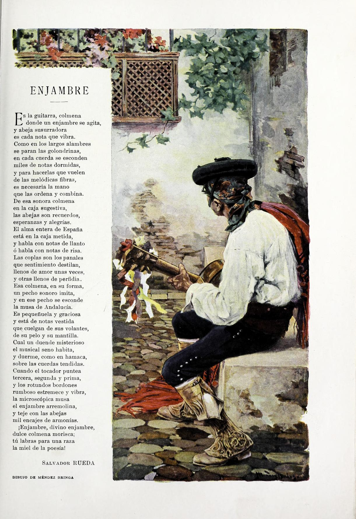 Enjambre.